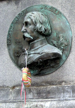 Nagysándor József honvéd vezérőrnagy, aradi vértanú. Dombormű az aradi Szabadság-szobor talapzatán 02